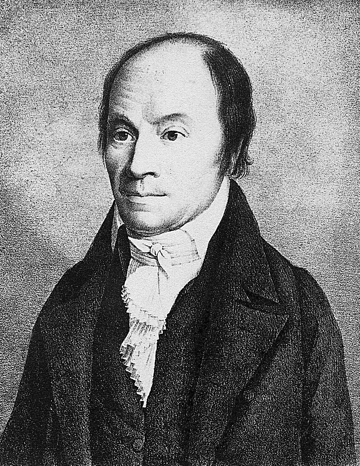 Portait de Jean Gaudin (1766-1833), botaniste vaudois